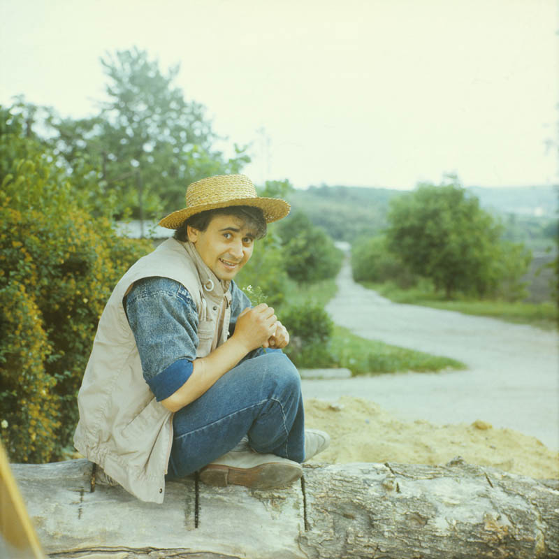 Petru Hadarca - Moldovan stage actor and director.